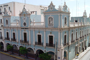 Antiguo hospicio colonial en Tepatitlan